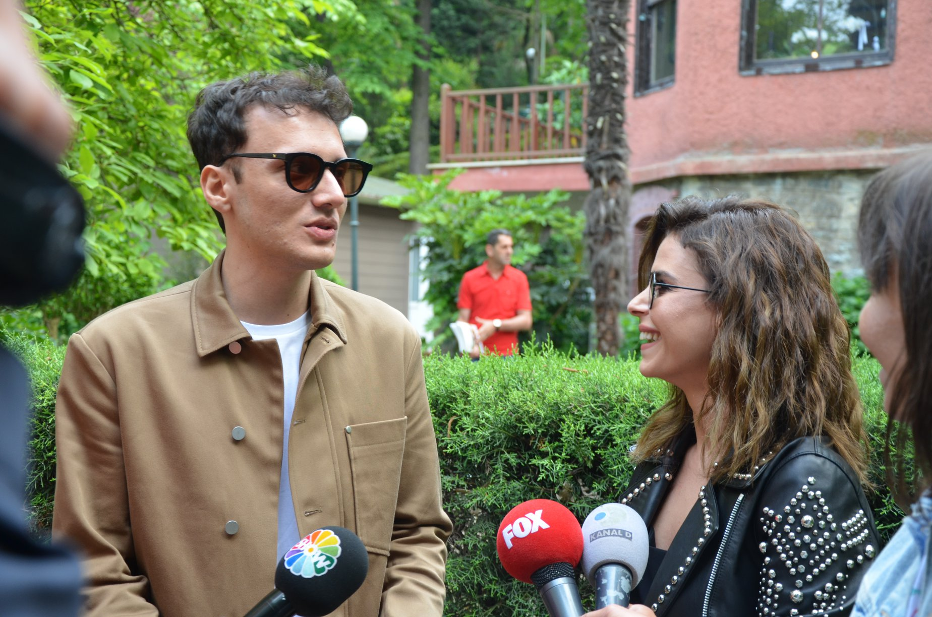 Türk şarkıcılar Edis ve Simge, 15. Radyo Boğaziçi Müzik Ödülleri'nde.